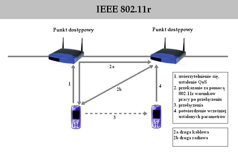 Schemat sposobu przełączania za pomocą protokołu 802.11r